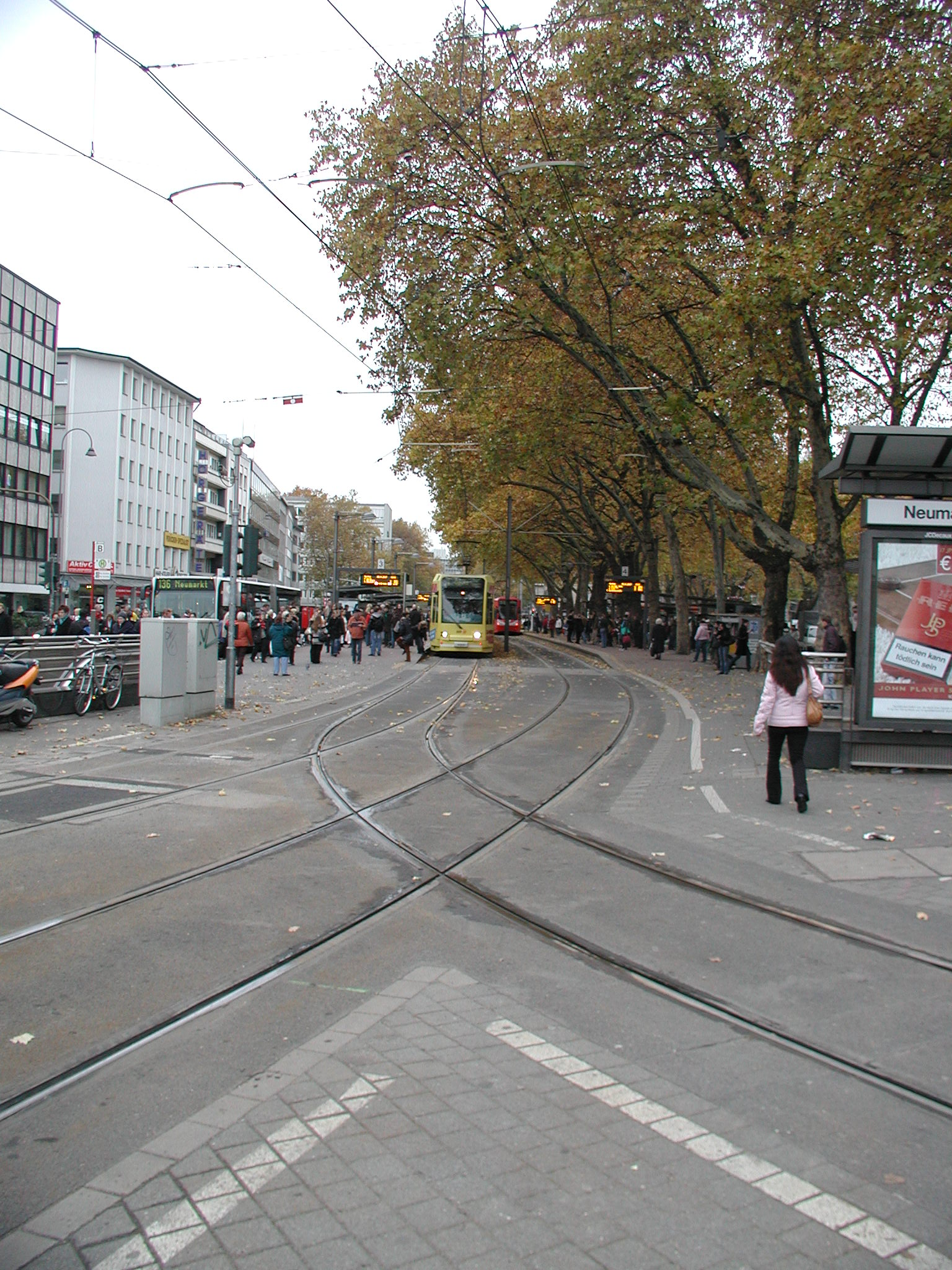 Köln, Stadtbahn-Station, Neumarkt